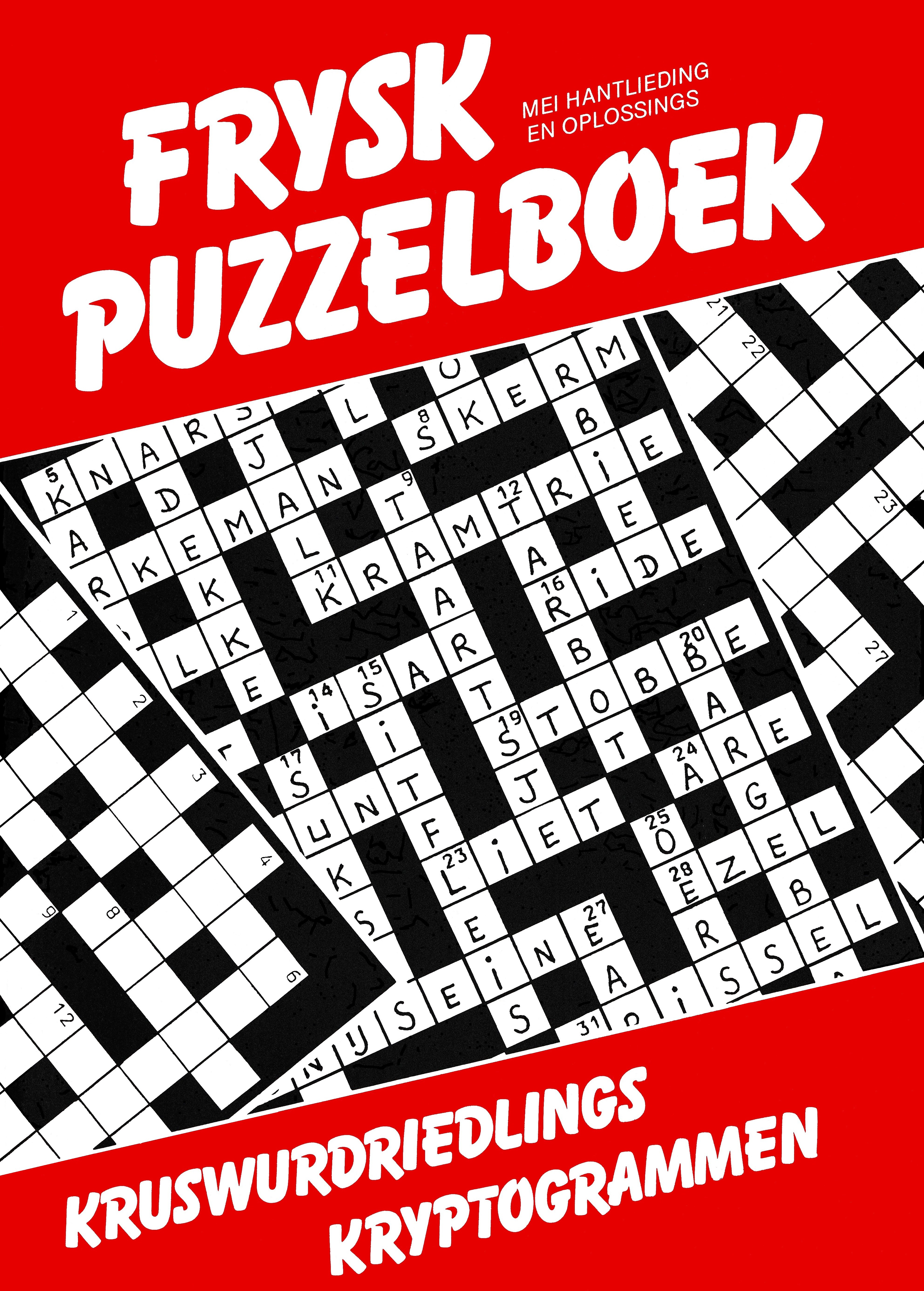 FryskPuzzelboek VDM, Ofbyld frijjûn troch de Friese Pers op 32 oktober 2006